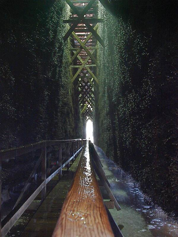 Saline oder Gradierwerk in Bad Orb